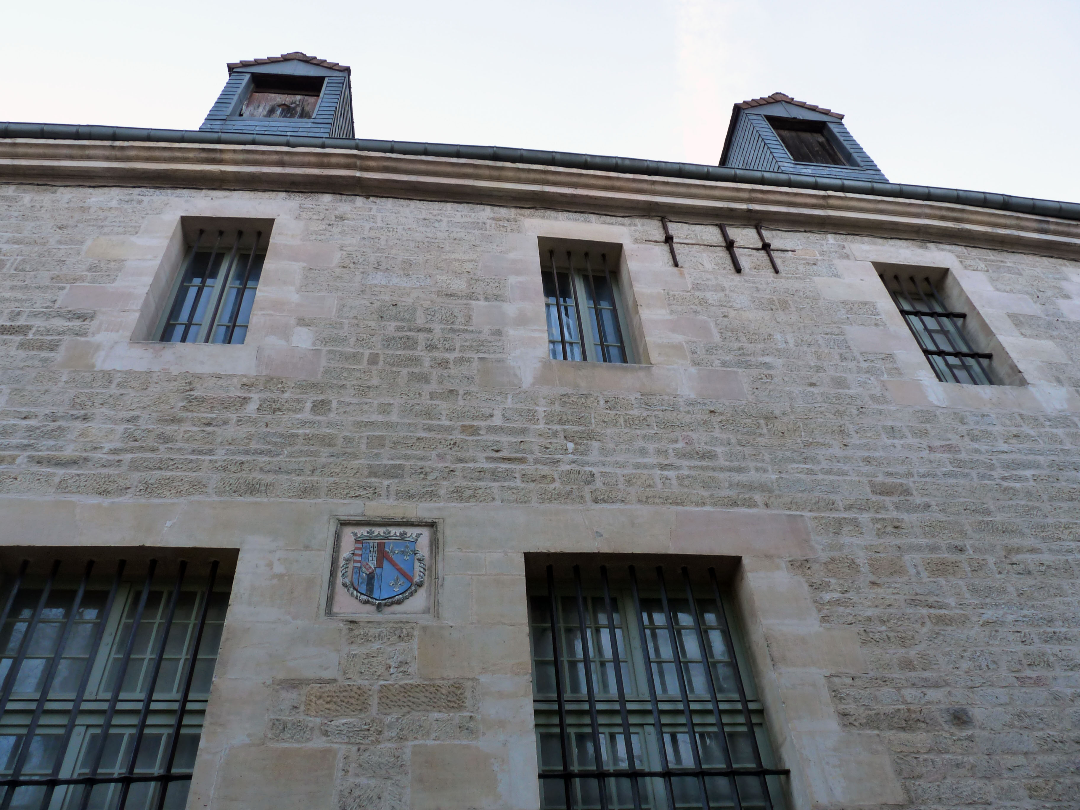 Auditoire de Joinville (Haute-Marne)